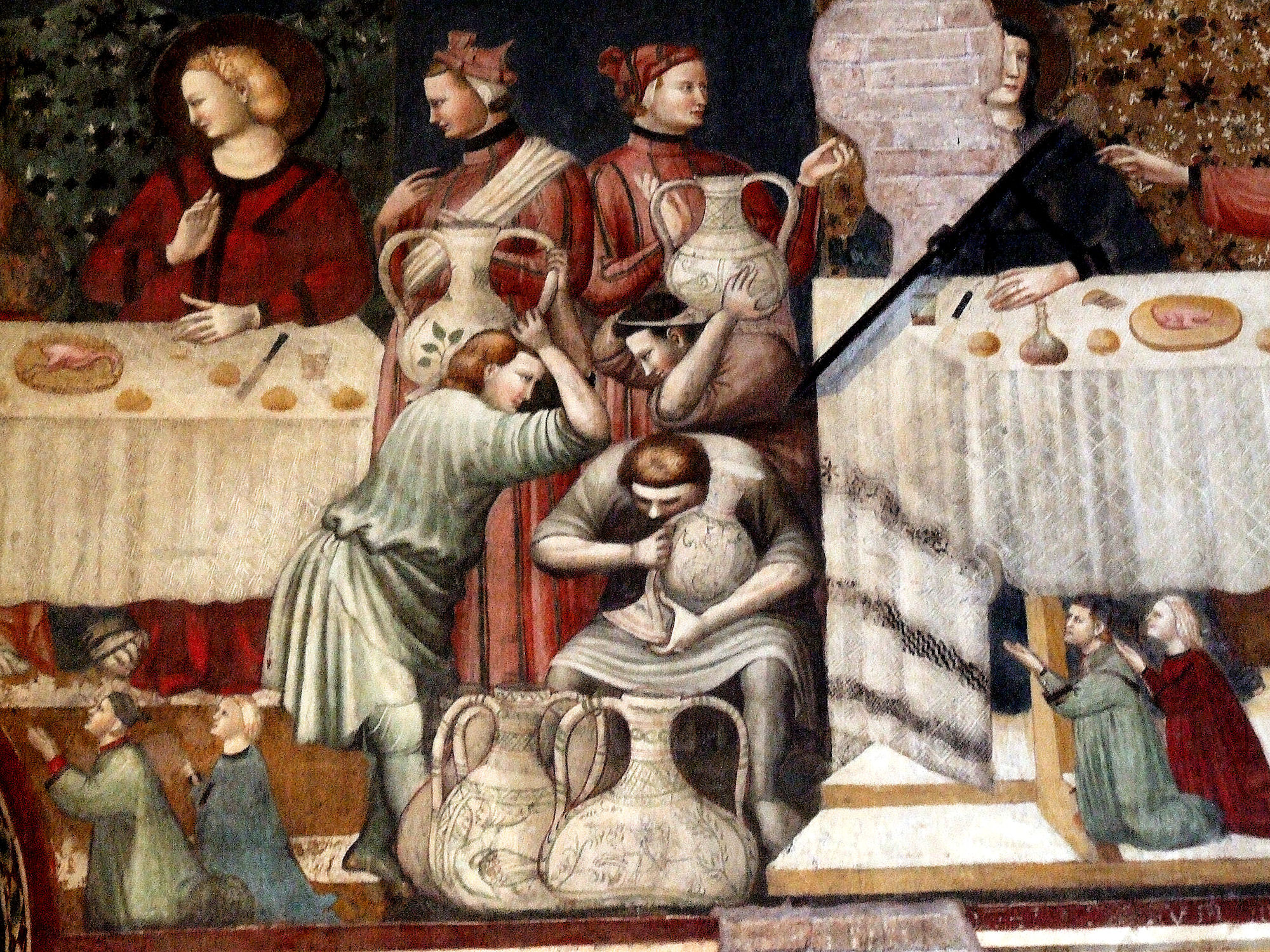 Cappellone di San Nicola, Basilica di San Nicola da Tolentino, Tolentino, Italy